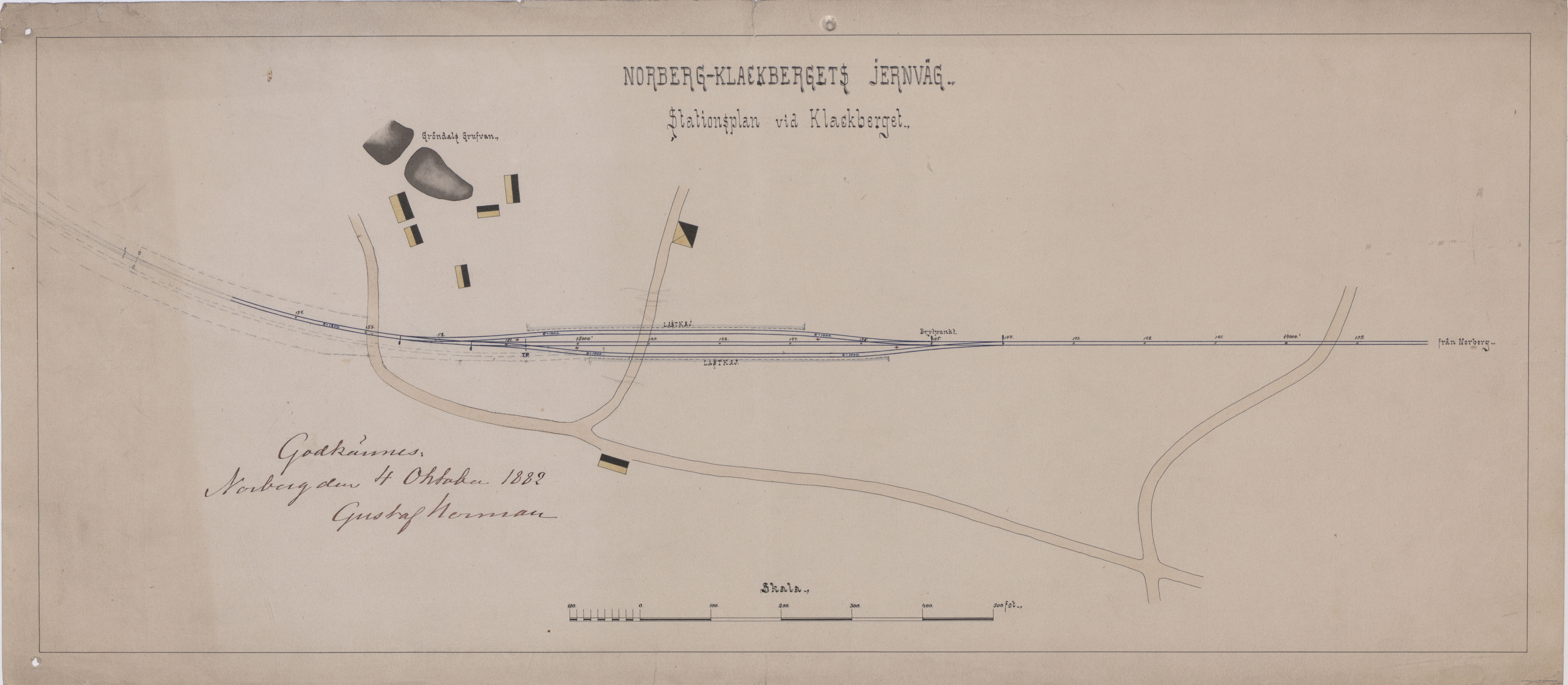 Norberg-Klackbergets Jernväg - 1882 Stationsplan vid Klackberget